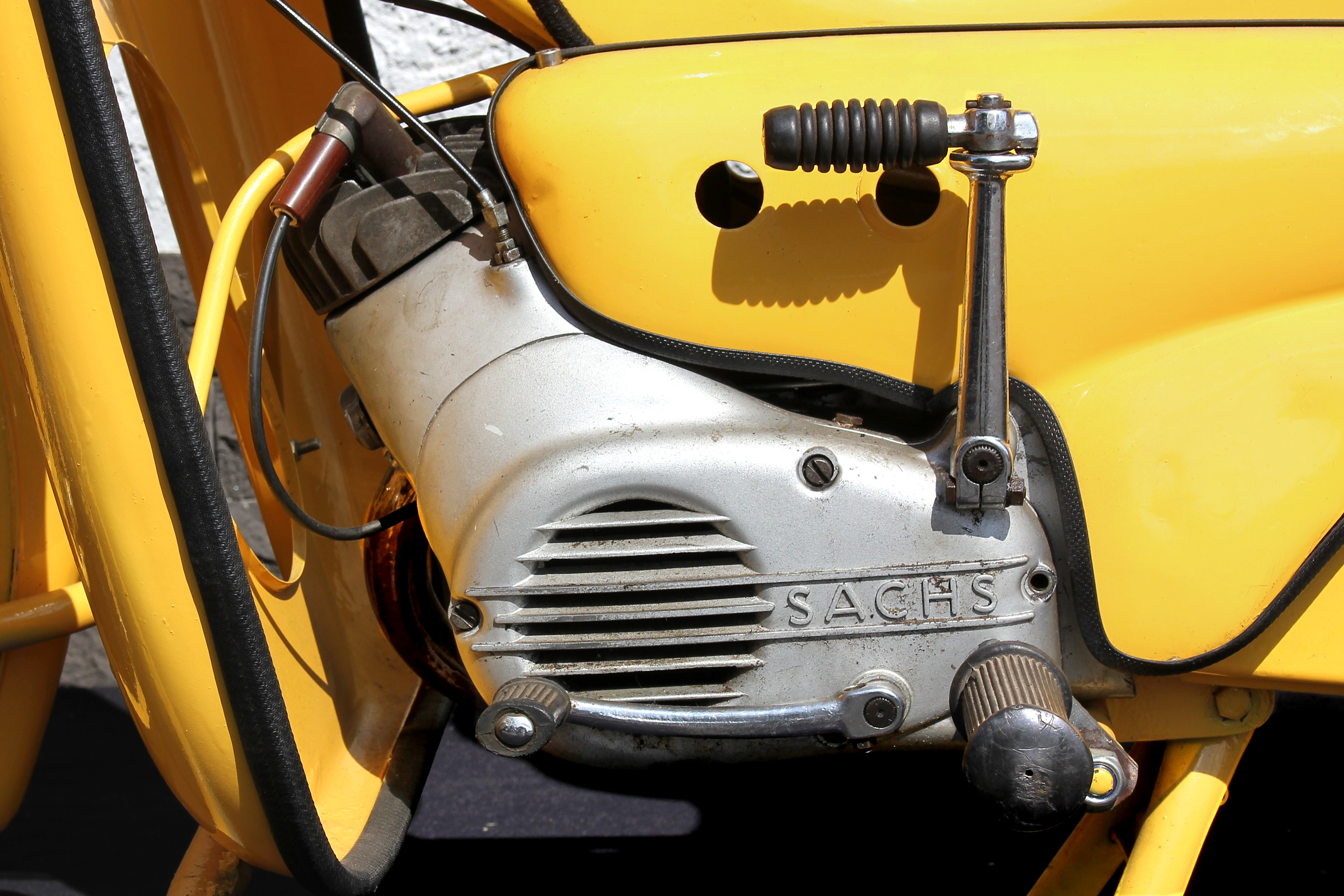 Sachs-Motor 50/3 MLFB, 47 cm³, 2,6 PS, 3-Gang-Fußschaltung